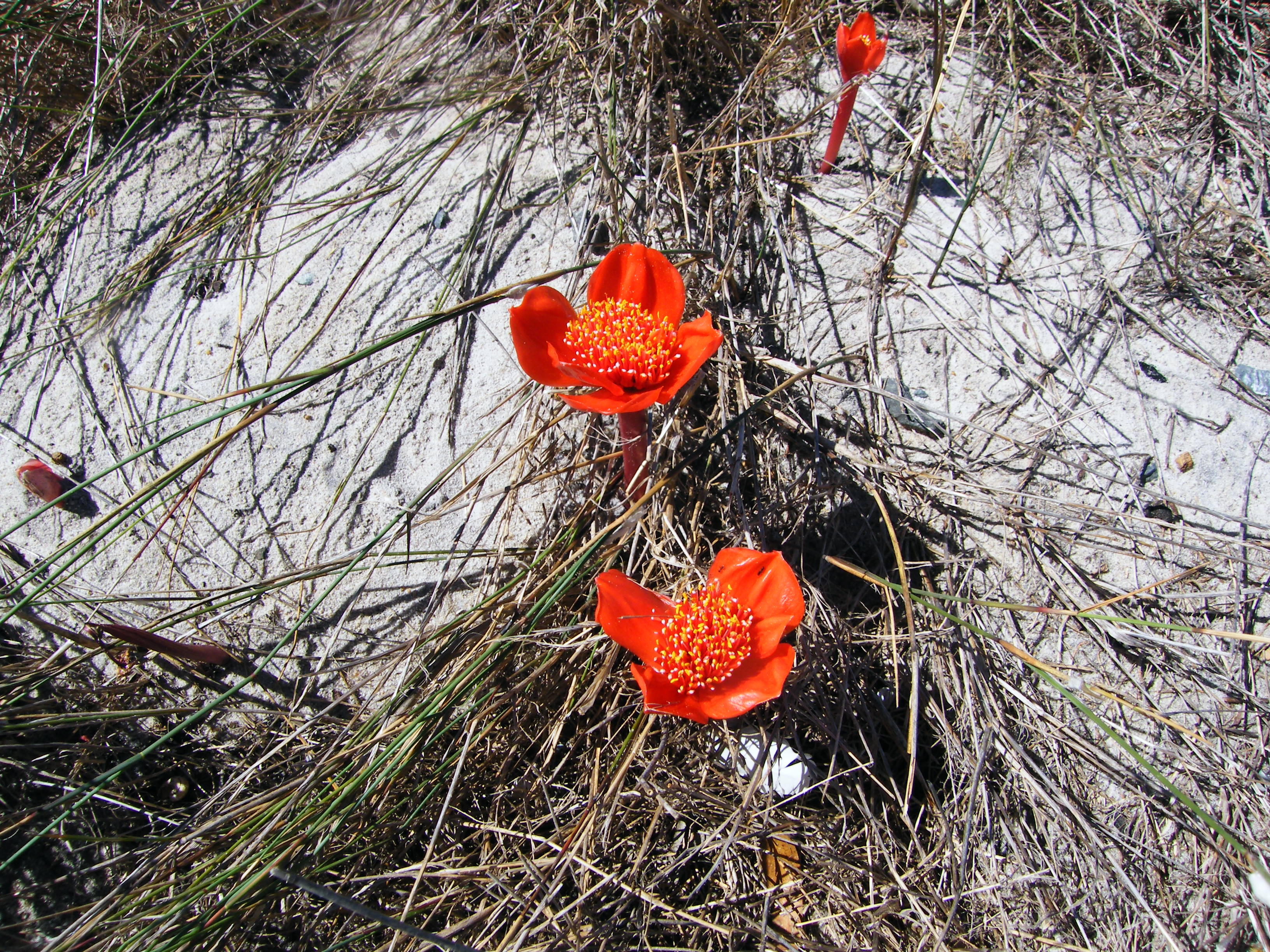 Poeierrkwas